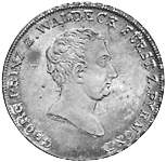 George I van Waldeck-Pyrmont